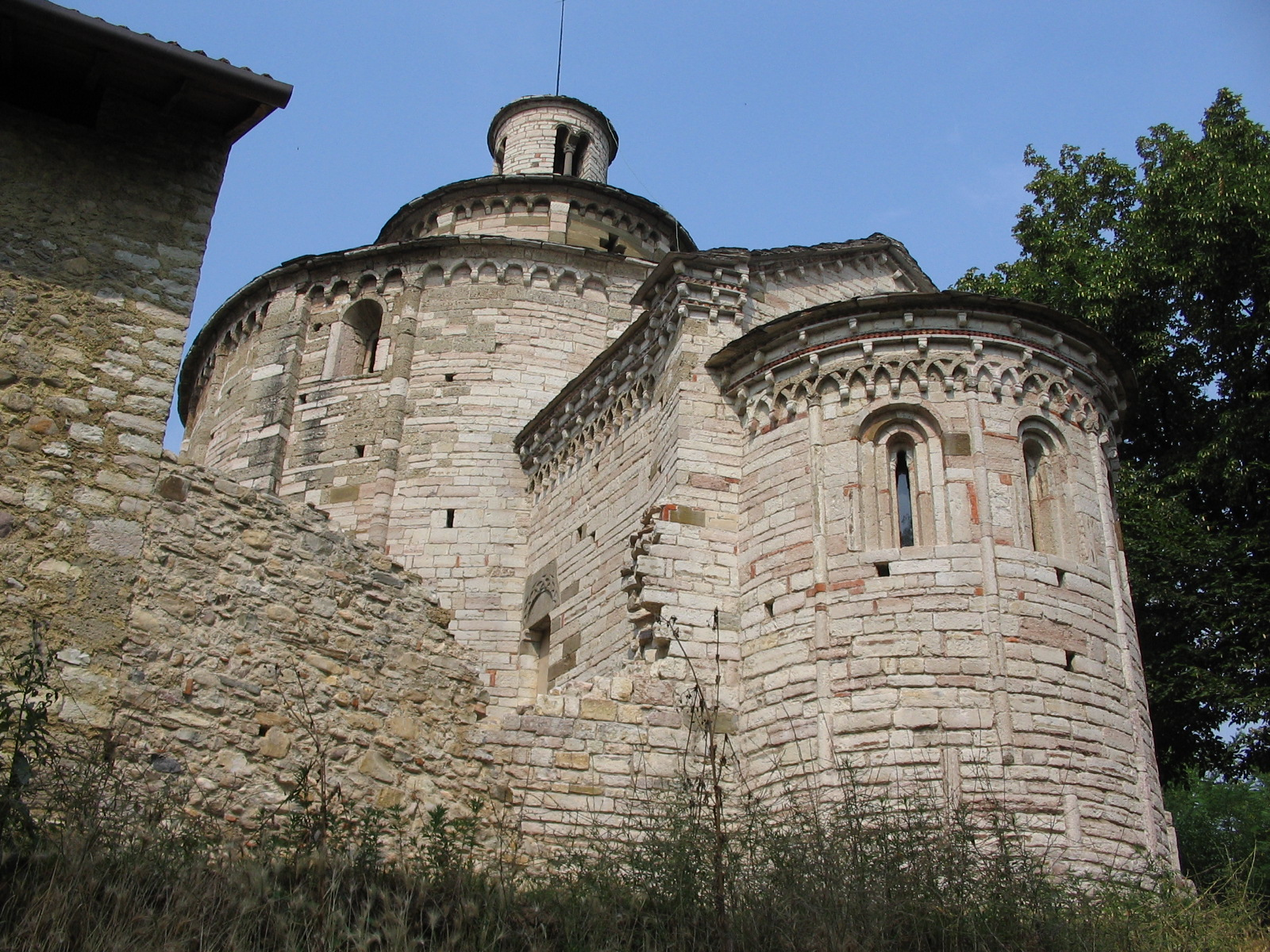 Autore Giorces. San Tomè, gioco volumi abside, presbiterio, chiesa dal retro.